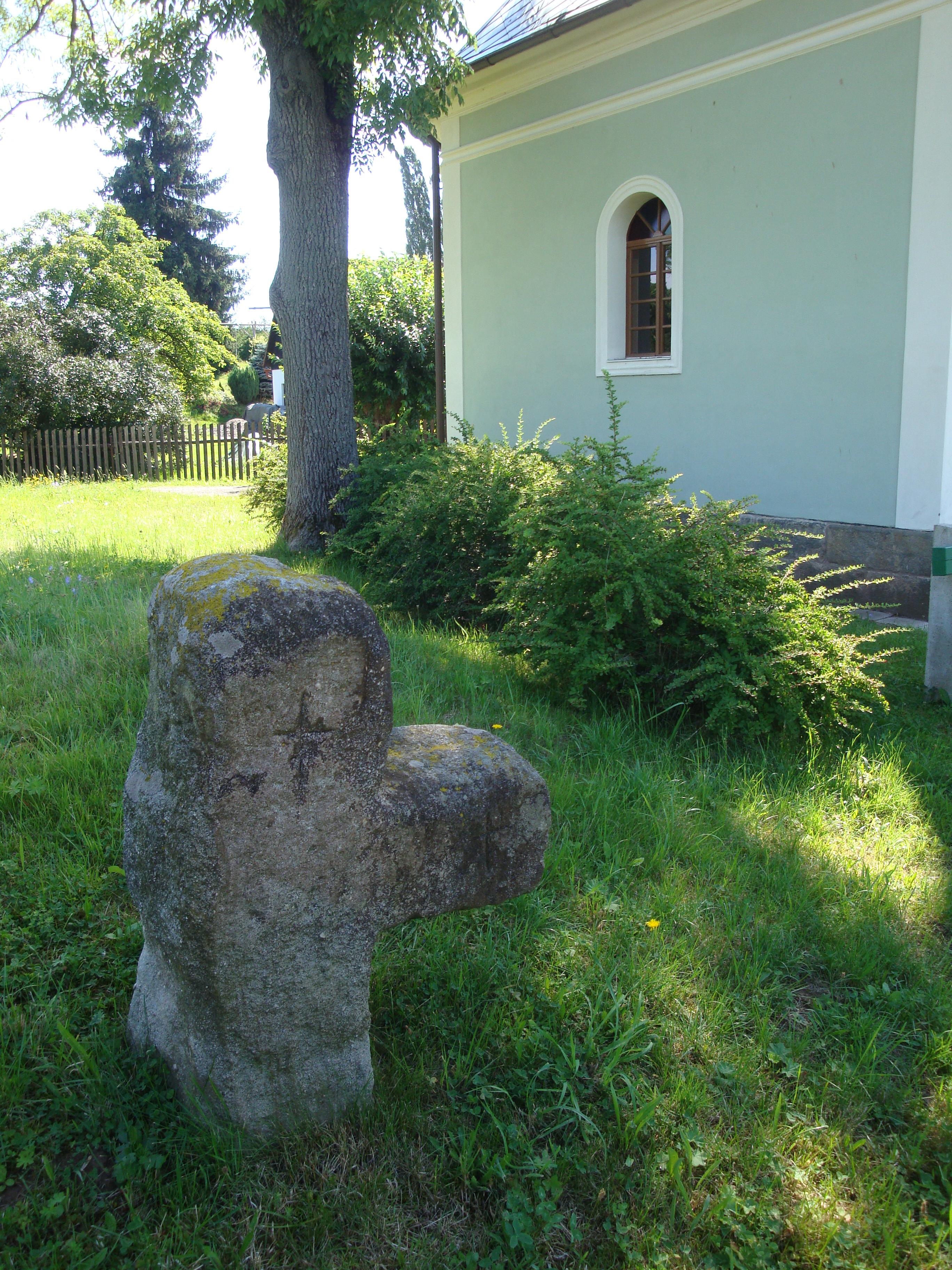 Smírčí kříž v obci Studenec (Trutnov)